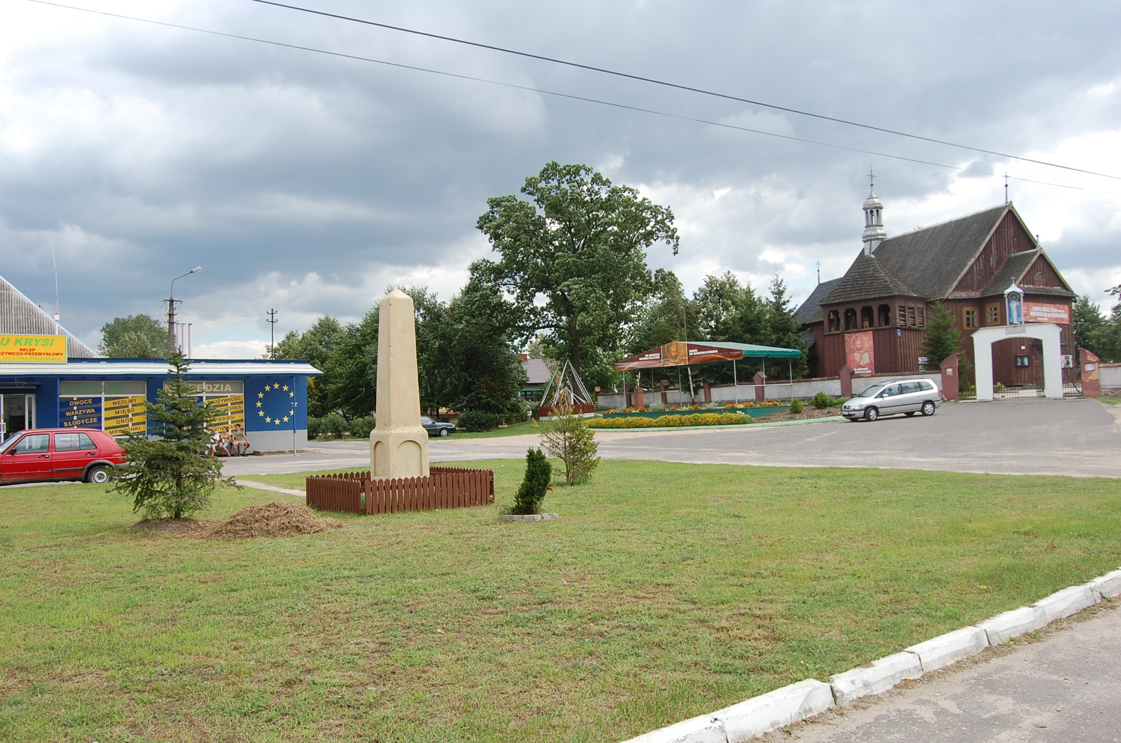 Rynek w Jeruzalu. W serialu Ranczo, rynek w Wikowyjach.